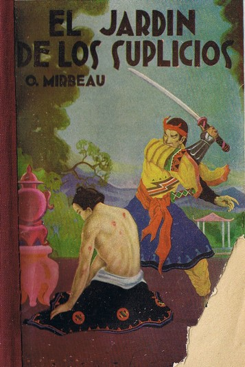 couverture de El Jardín de los suplicios, d'Octave Mirbeau (1848-1917)